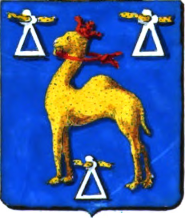 In blauw, een rood gekroonde, gouden kemel, met in den mond een gouden ring, waarvan een roode toom, vergezeld van drie zilveren ouderwetsche stijgbeugels, met gouden riem.